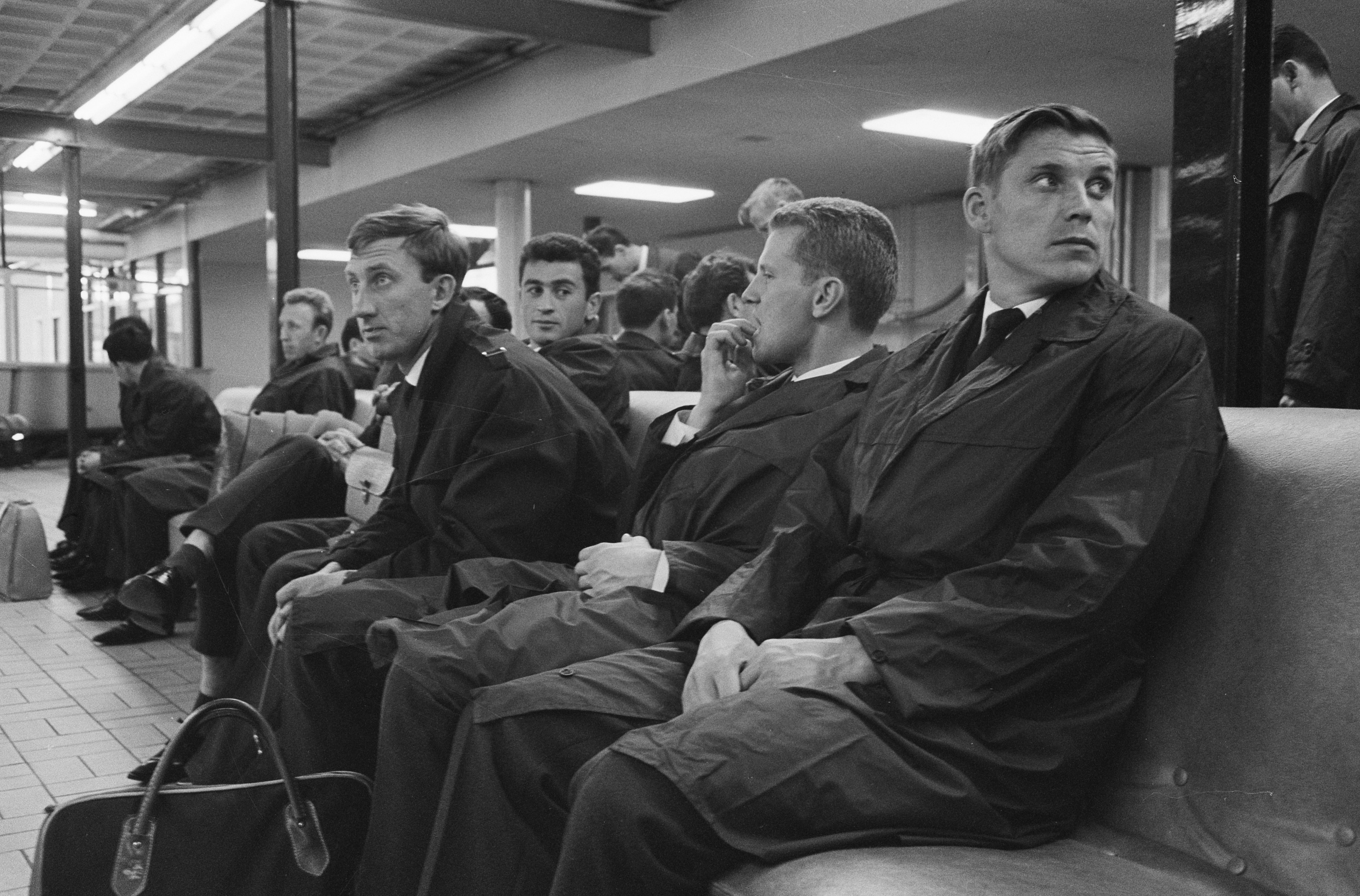 Collectie / Archief : Fotocollectie Anefo Reportage / Serie : [ onbekend ] Beschrijving : Russisch elftal op doorreis naar Chili (in de wachtkamer) Datum : 17 mei 1962 Locatie : Chili Trefwoorden : WACHTKAMERS, elftallen Fotograaf : Pot, Harry / Anefo Auteursrechthebbende : Nationaal Archief Materiaalsoort : Negatief (zwart/wit) Nummer archiefinventaris : bekijk toegang 2.24.01.05 Bestanddeelnummer : 913-9301